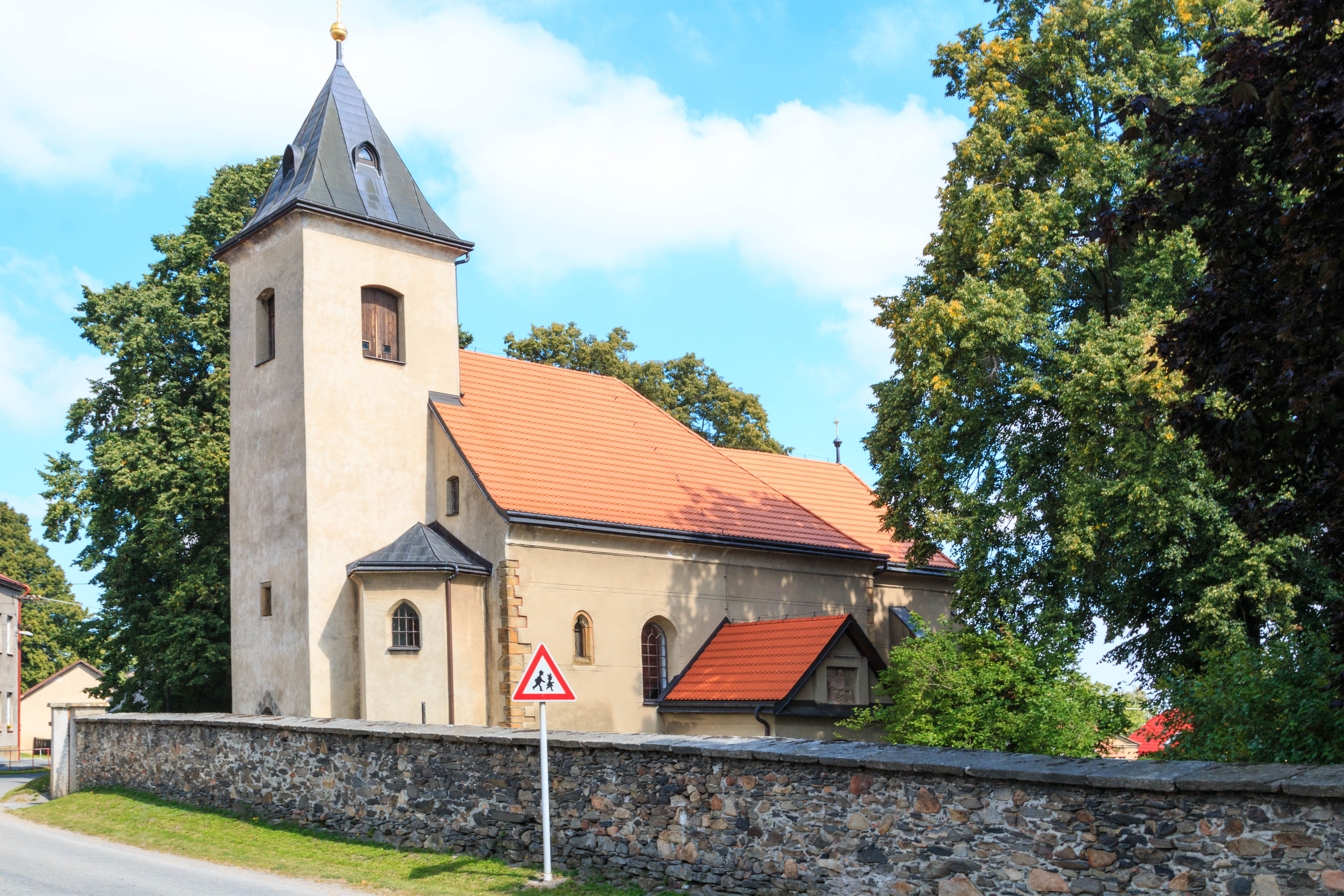 Kostel svatého Jakuba, Raná (okres Chrudim).